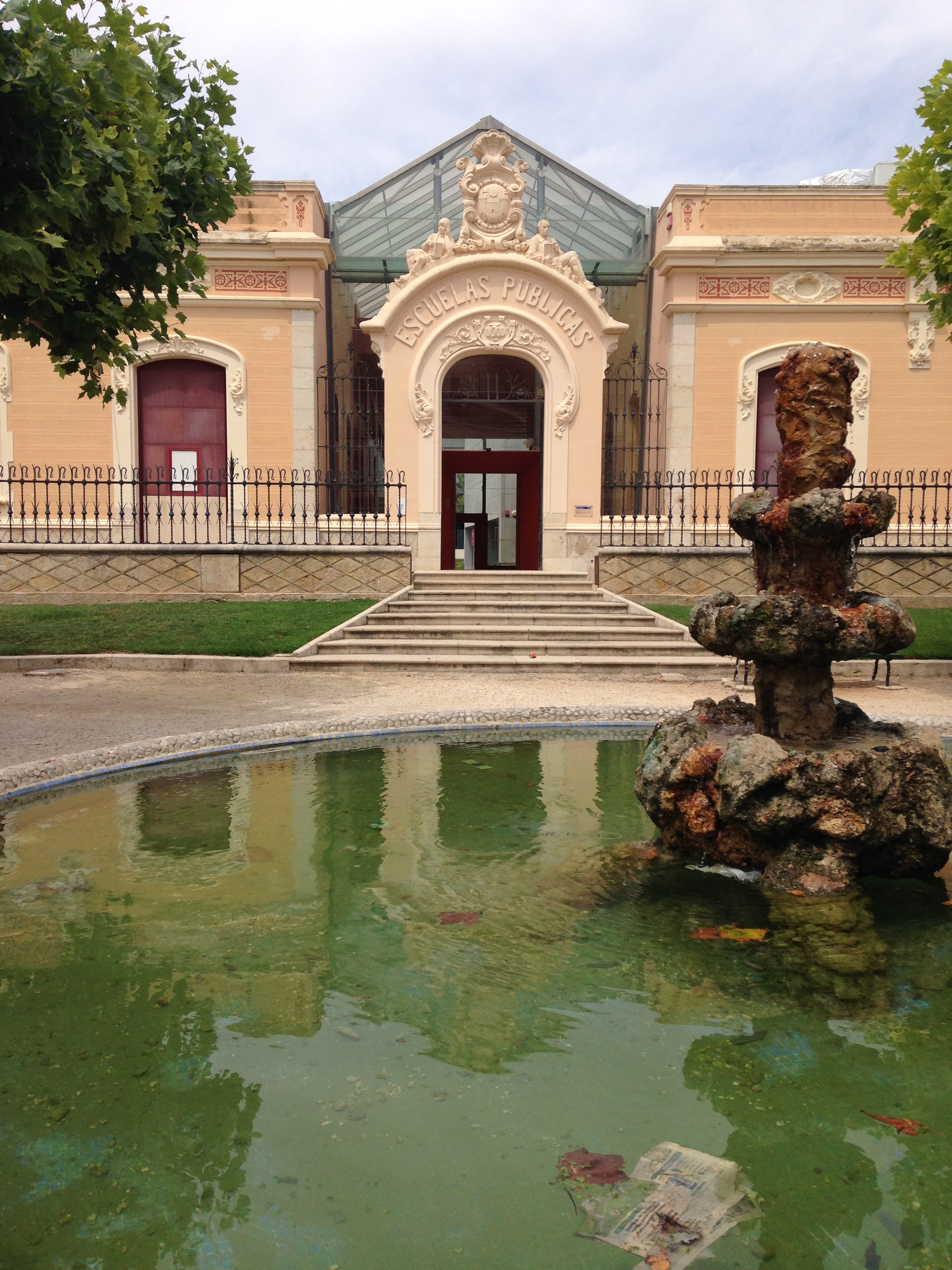 Amposta